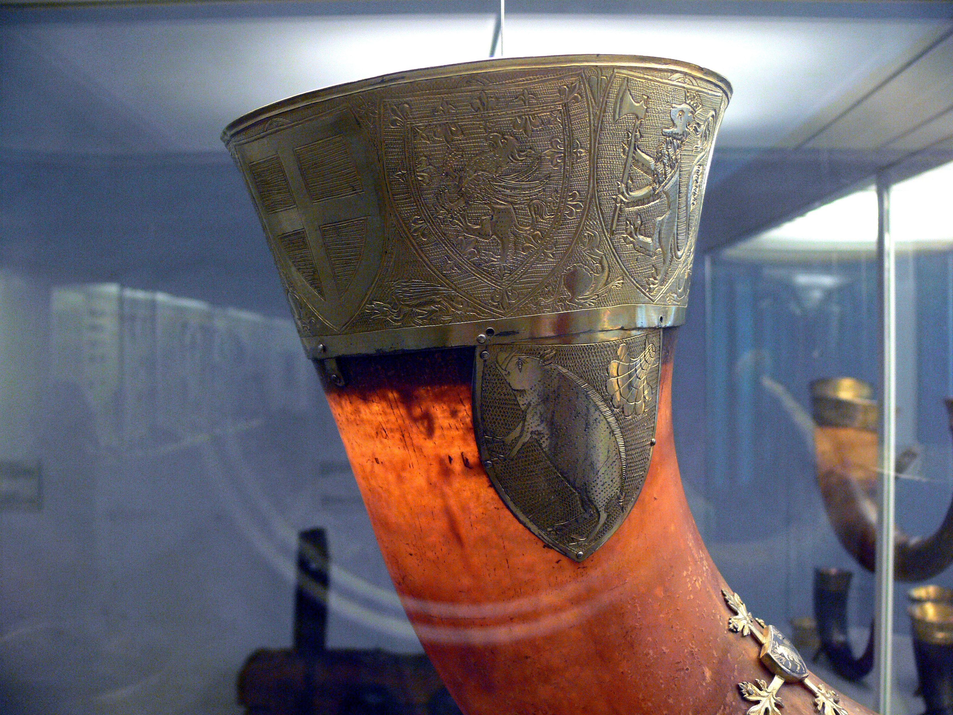 Ein Trinkhorn aus Island. Kam um 1700 nach Kopenhagen.